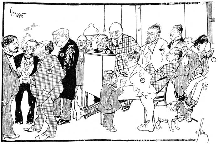 Карикатура М. С. Линского